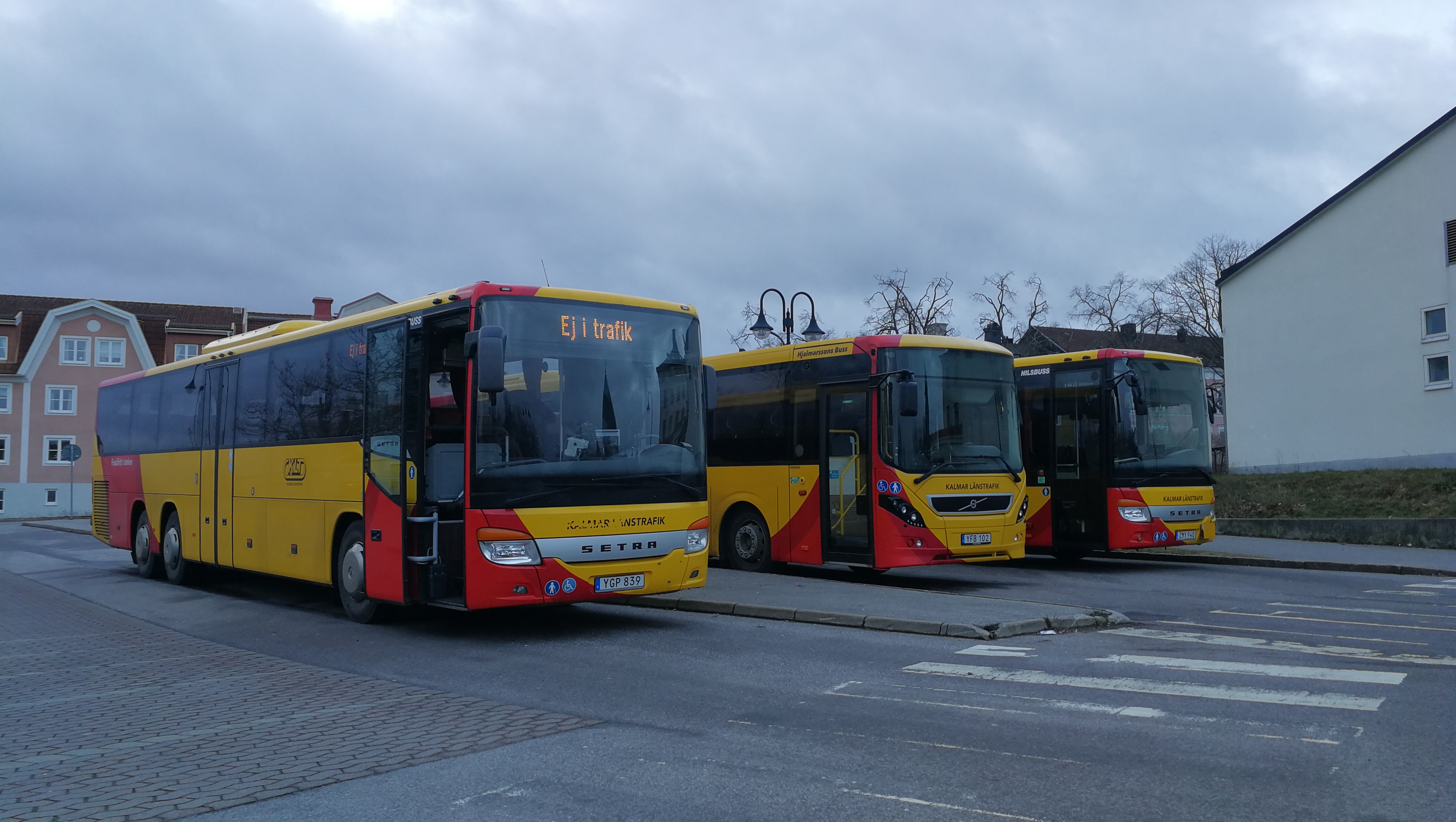 KLT-bussar vid Västerviks Resecentrum